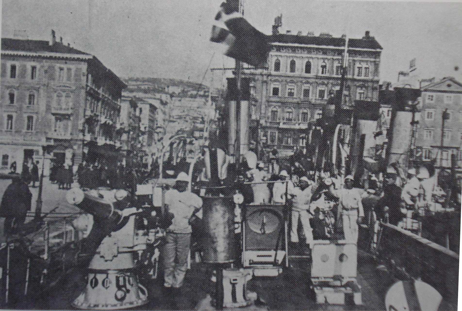 Talijanski razarači u riječkoj luci, studeni 1918.